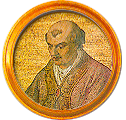 Médaillon de la frise des papes à Saint-Paul-hors-les-Murs. Il s'agit d'une mosaïque représentant Nicolas II, 155e pape de l'Église catholique (1058-1061). Il fait parie de la série de médaillons voulue par Grégoire XVI destinée à remplacer ceux de l'ancienne basilique après l'incendie de 1823.